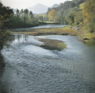 Desde el histórico puente de Vargas se ve fluctuar al Pas.